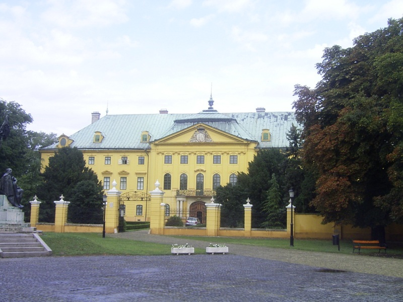 Kalocsa Bischöfliche Residenz